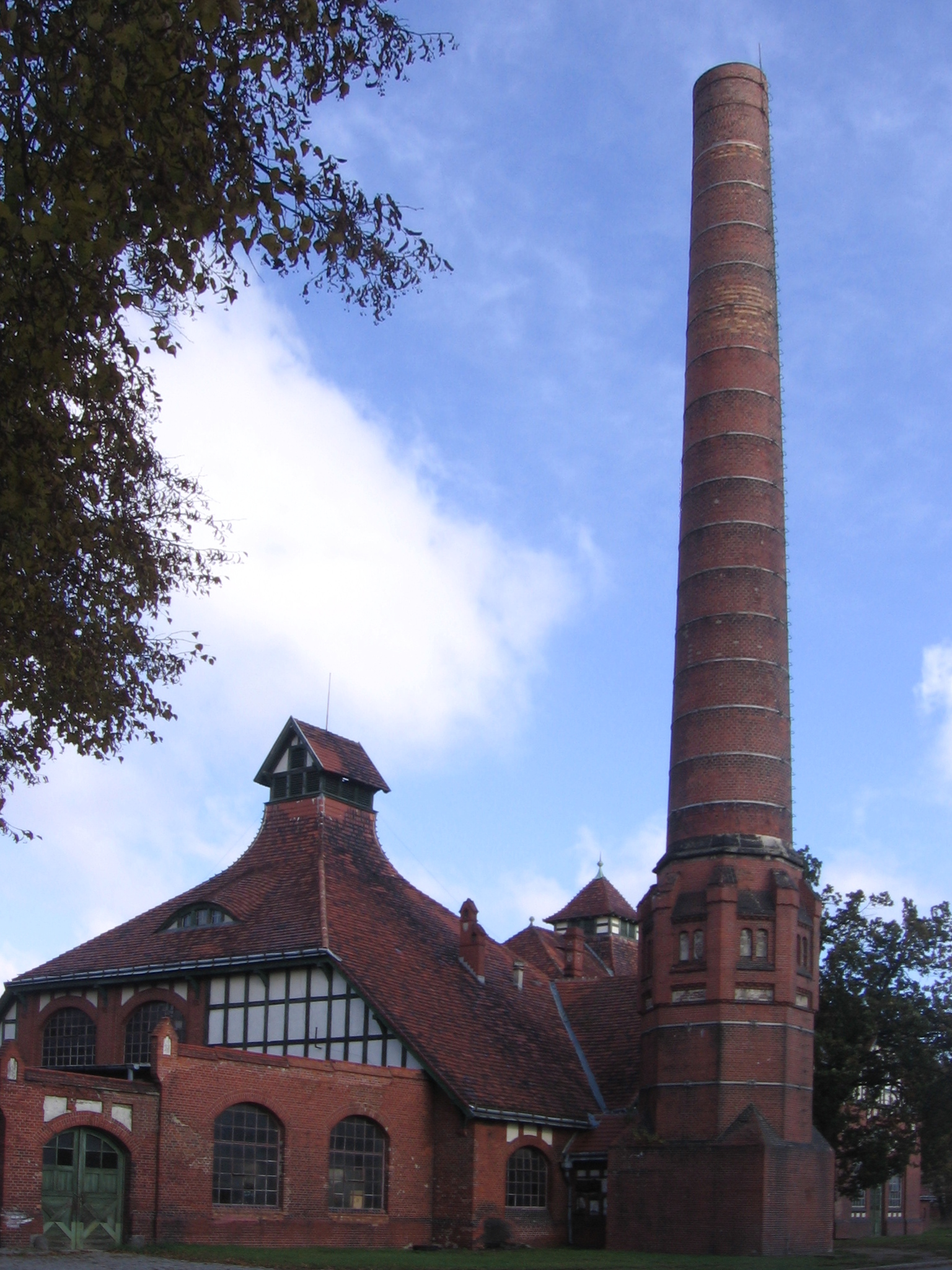 Wrocław, przepompownia przy ul. Świątnickiej (zabytek nr A/2649/413/Wm)